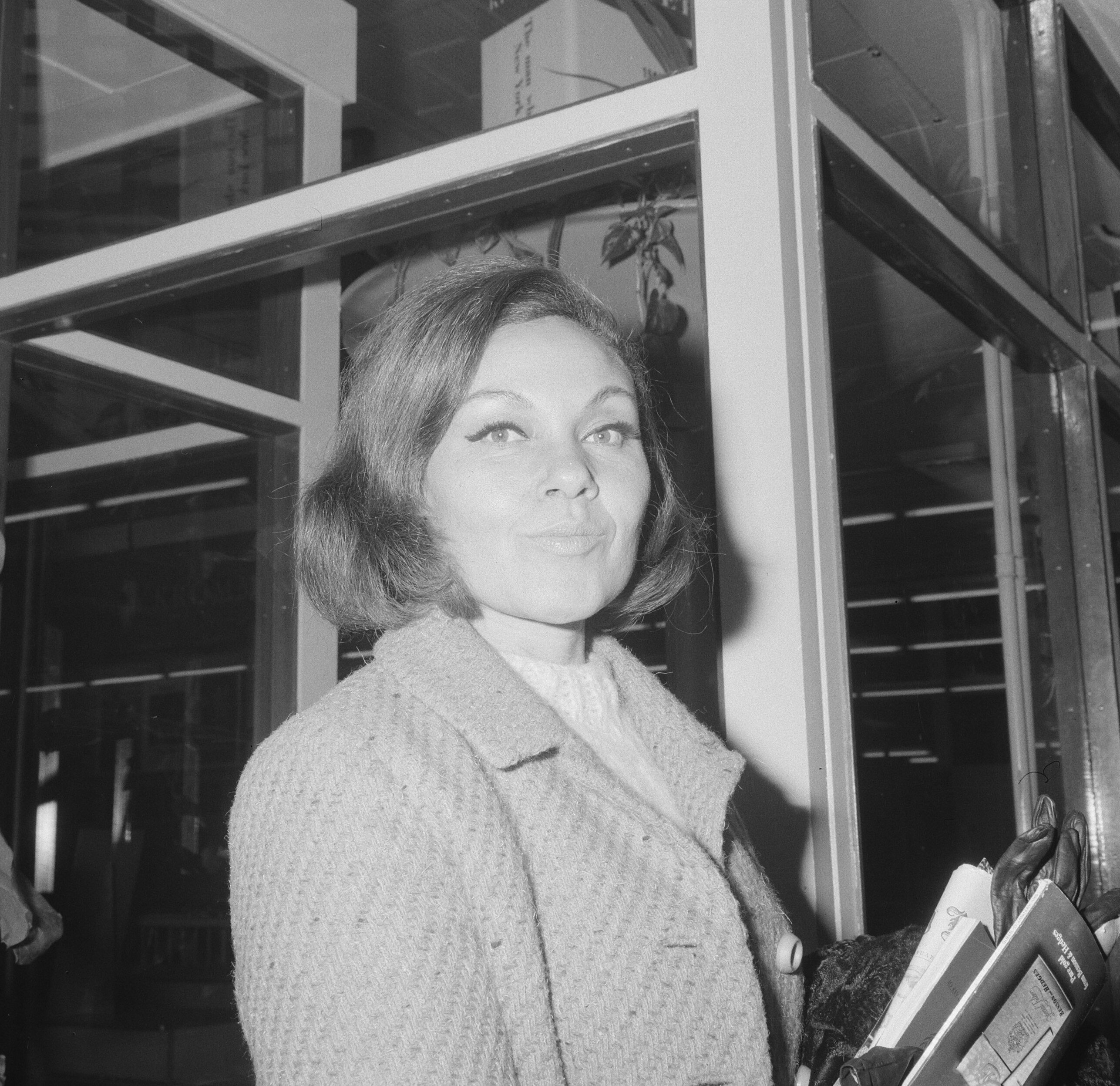 Collectie / Archief : Fotocollectie Anefo Reportage / Serie : [ onbekend ] Beschrijving : Aankomst Cleo Laine (jazz-zangeres) op Schiphol (kop), Cleo Laine. Datum : 27 januari 1965 Locatie : Noord-Holland, Schiphol Trefwoorden : aankomsten Persoonsnaam : Cleo Laine Fotograaf : Gelderen, Hugo van / Anefo Auteursrechthebbende : Nationaal Archief Materiaalsoort : Negatief (zwart/wit) Nummer archiefinventaris : bekijk toegang 2.24.01.03 Bestanddeelnummer : 917-3805